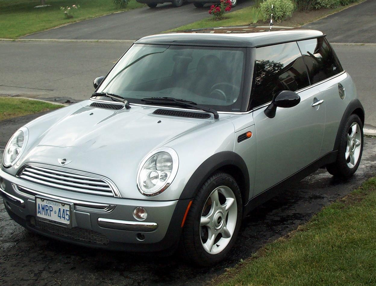 Mini CooperClean car